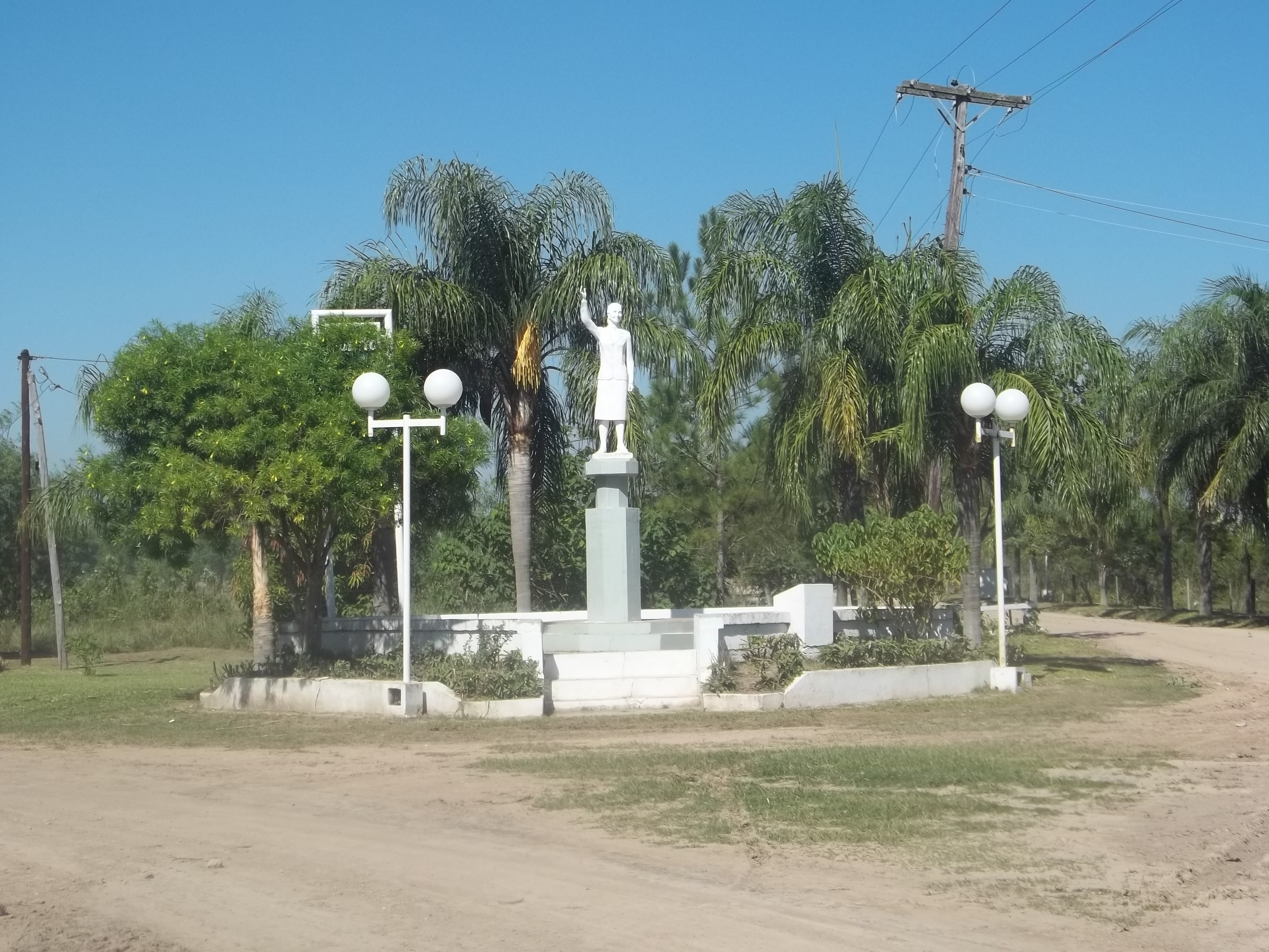 Entry to Puerto Eva Perón, with a sculpture of Eva Perón.